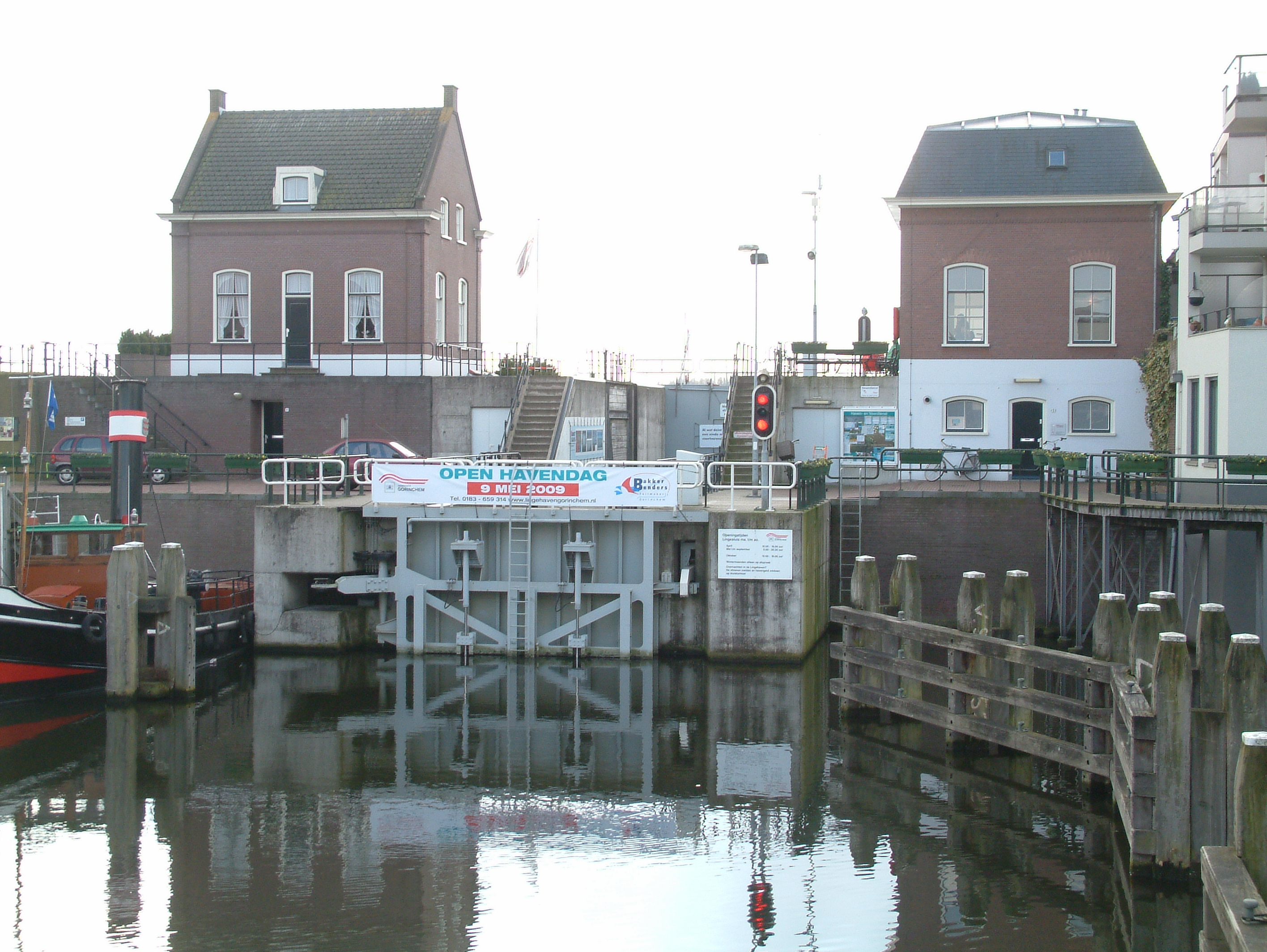 De Lingesluis in Gorinchem tussen de Linge en de Merwede